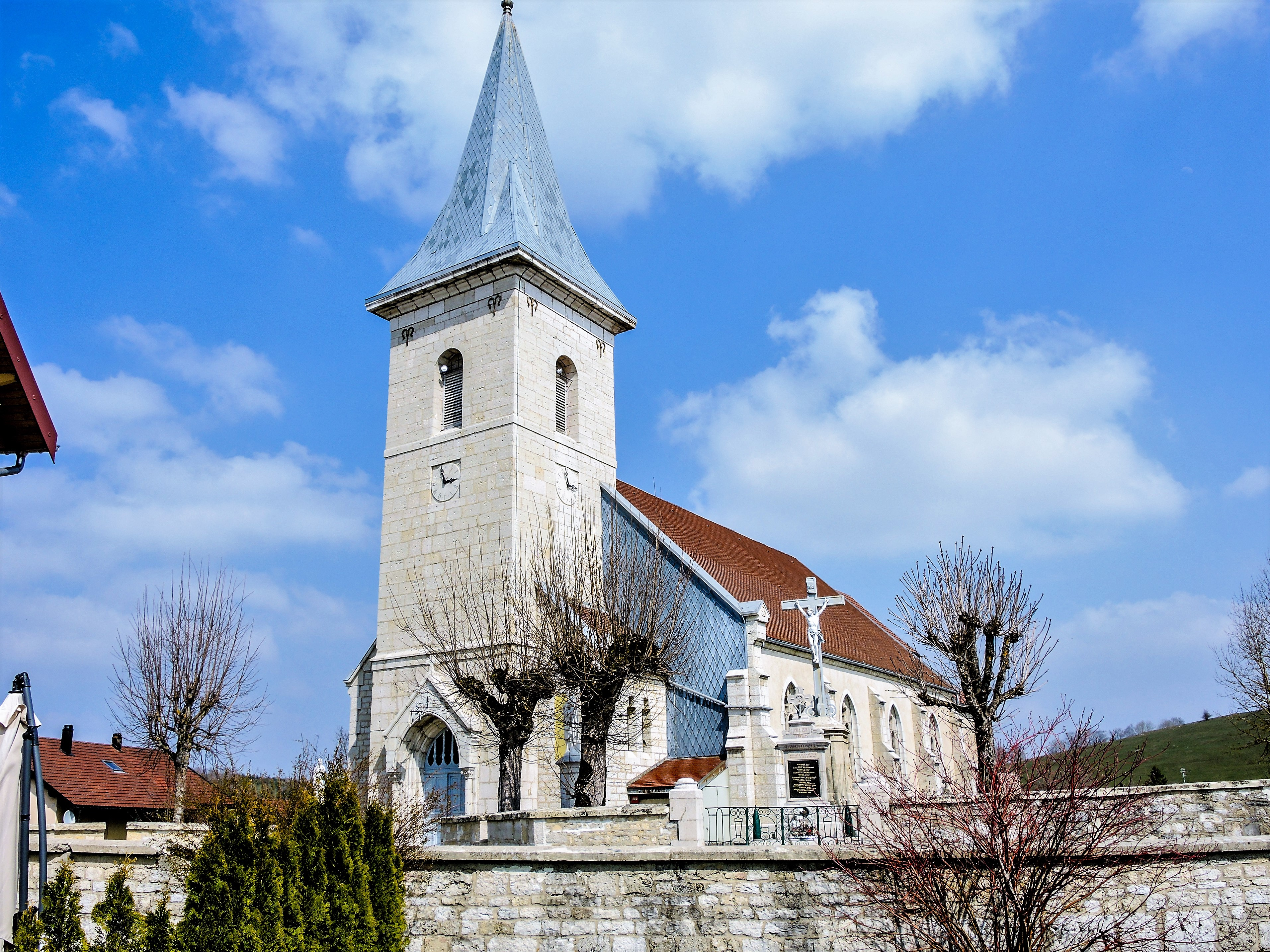 Eglise de Chaffois